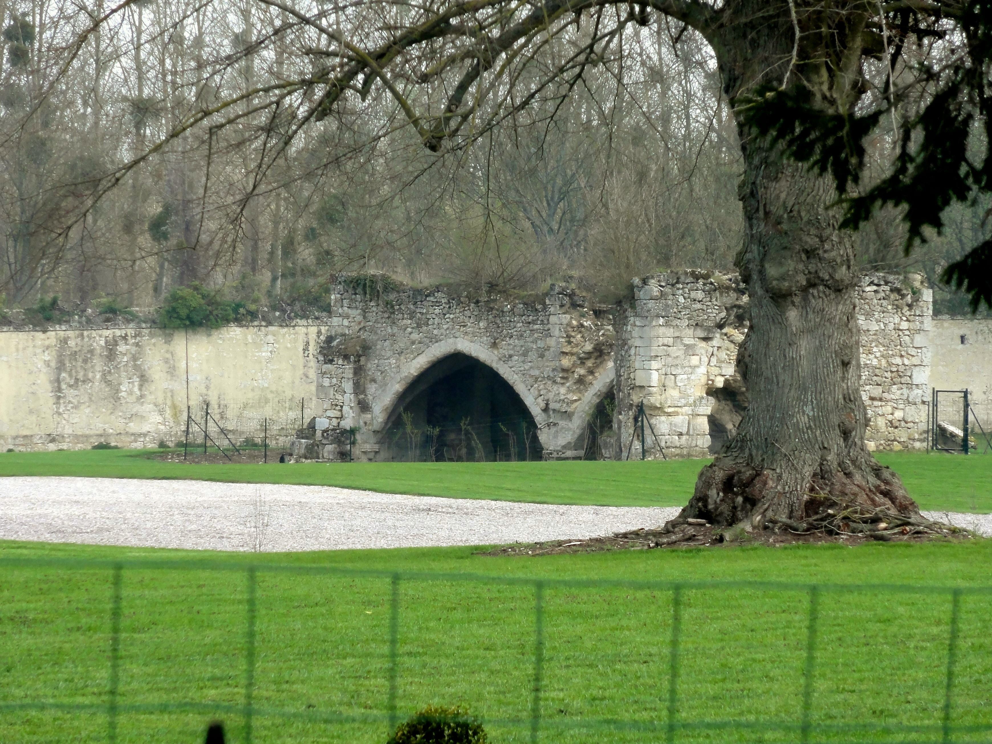 Ruine d'une salle voûtée.